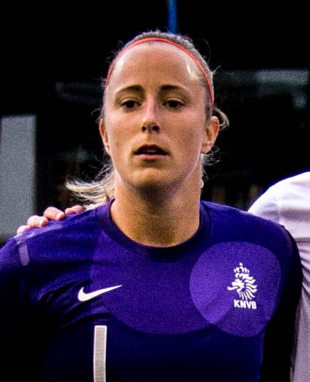 StampMedia